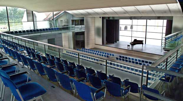 Bühnenansicht Stadtsaal